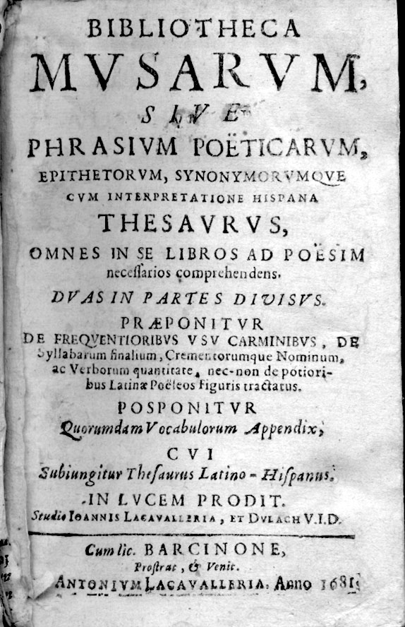 Portada (front cover) del Bibliotheca Musarum de Joan Lacavalleria i Dulach.